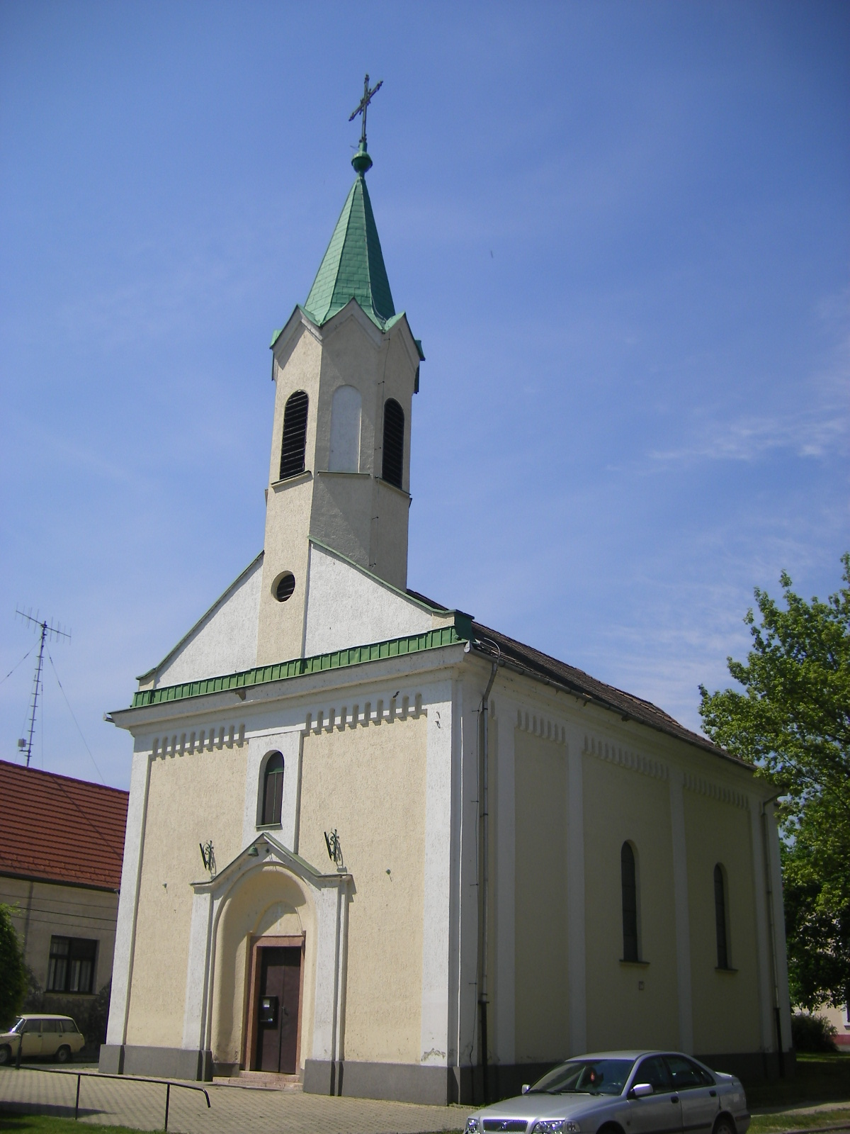 Dél-Komárom - Szt. István-templom